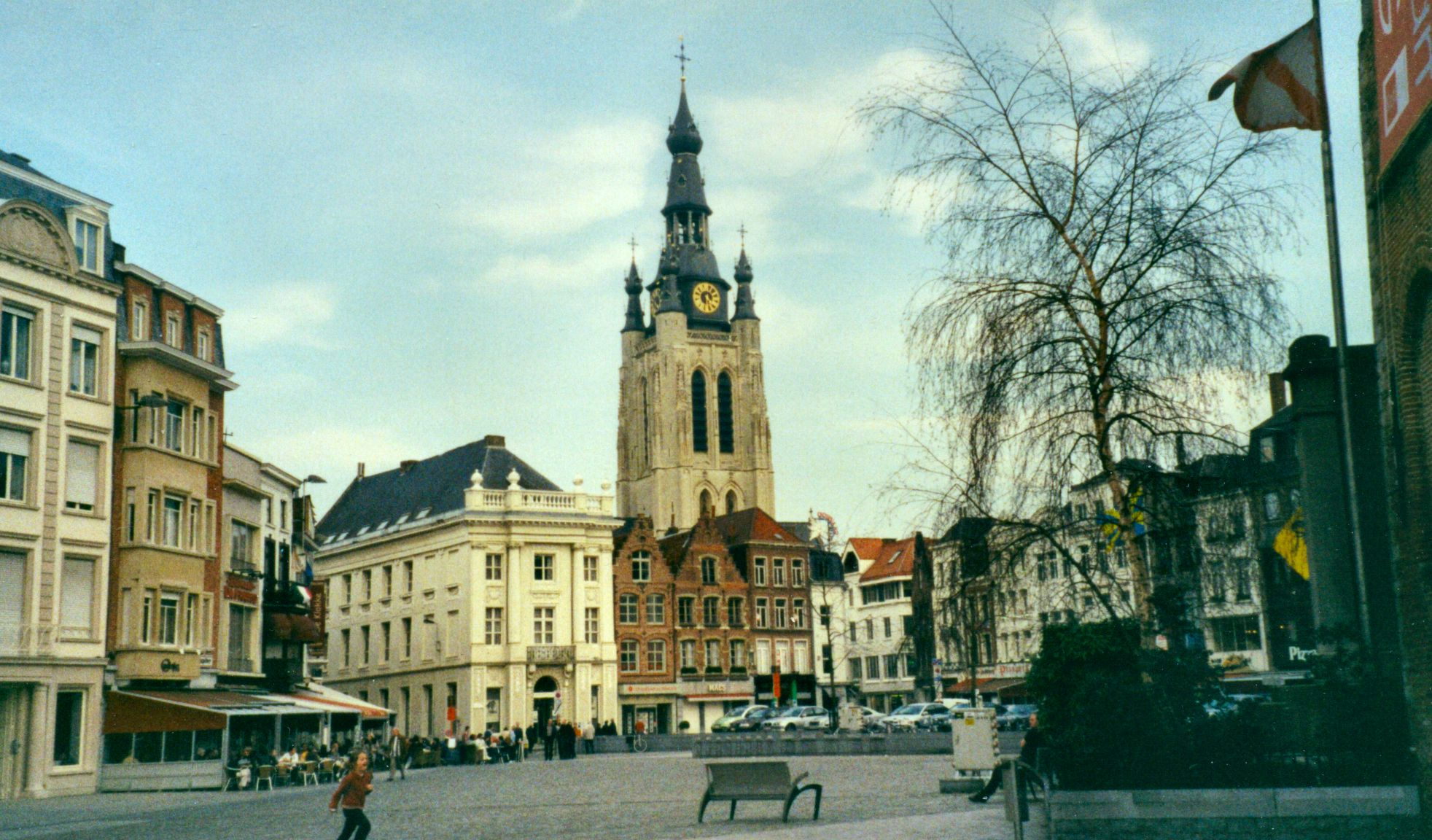 The centre of Kortrijk, Flanders, Belgium.